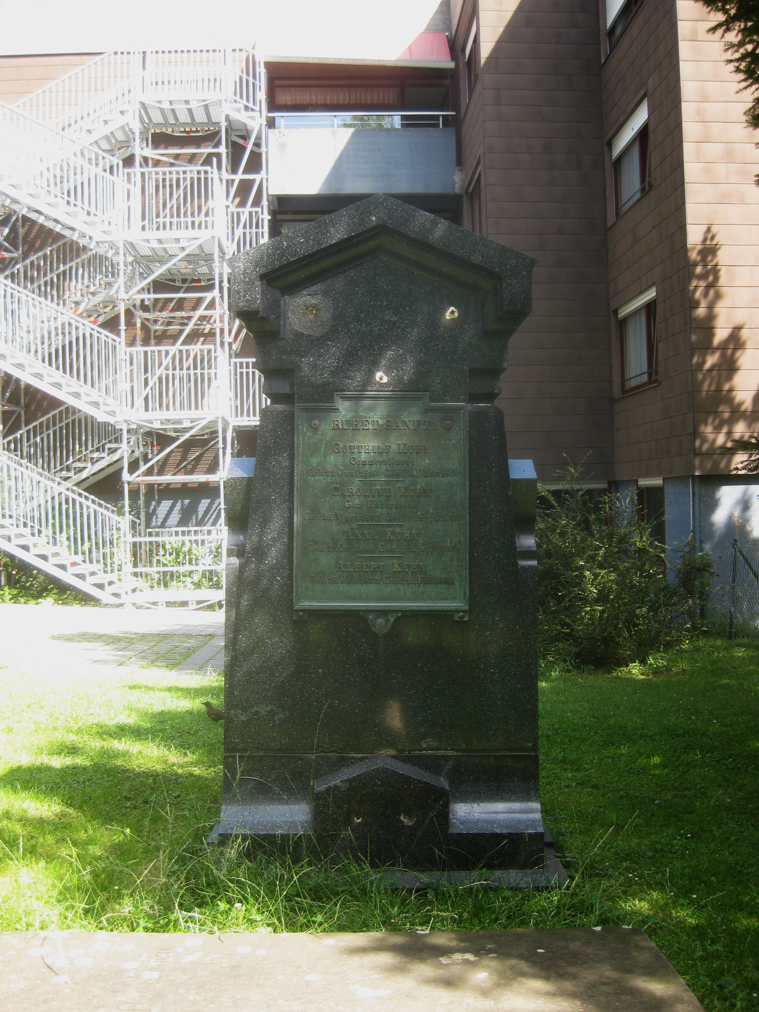 Familiengrab von Gotthilf Kuhn, seiner Frau Caroline Kuhn geb. Haberzettel und der Kinder Anna Kuhn und Albert Kuhn. Standort: Ehemaligen Kirchhof Berg, der bei der abgegangenen alten Berger Kirche lag, am Nordrand des Parks der Villa Berg, nahe dem Vereinsheim des Männergesangvereins Berg.